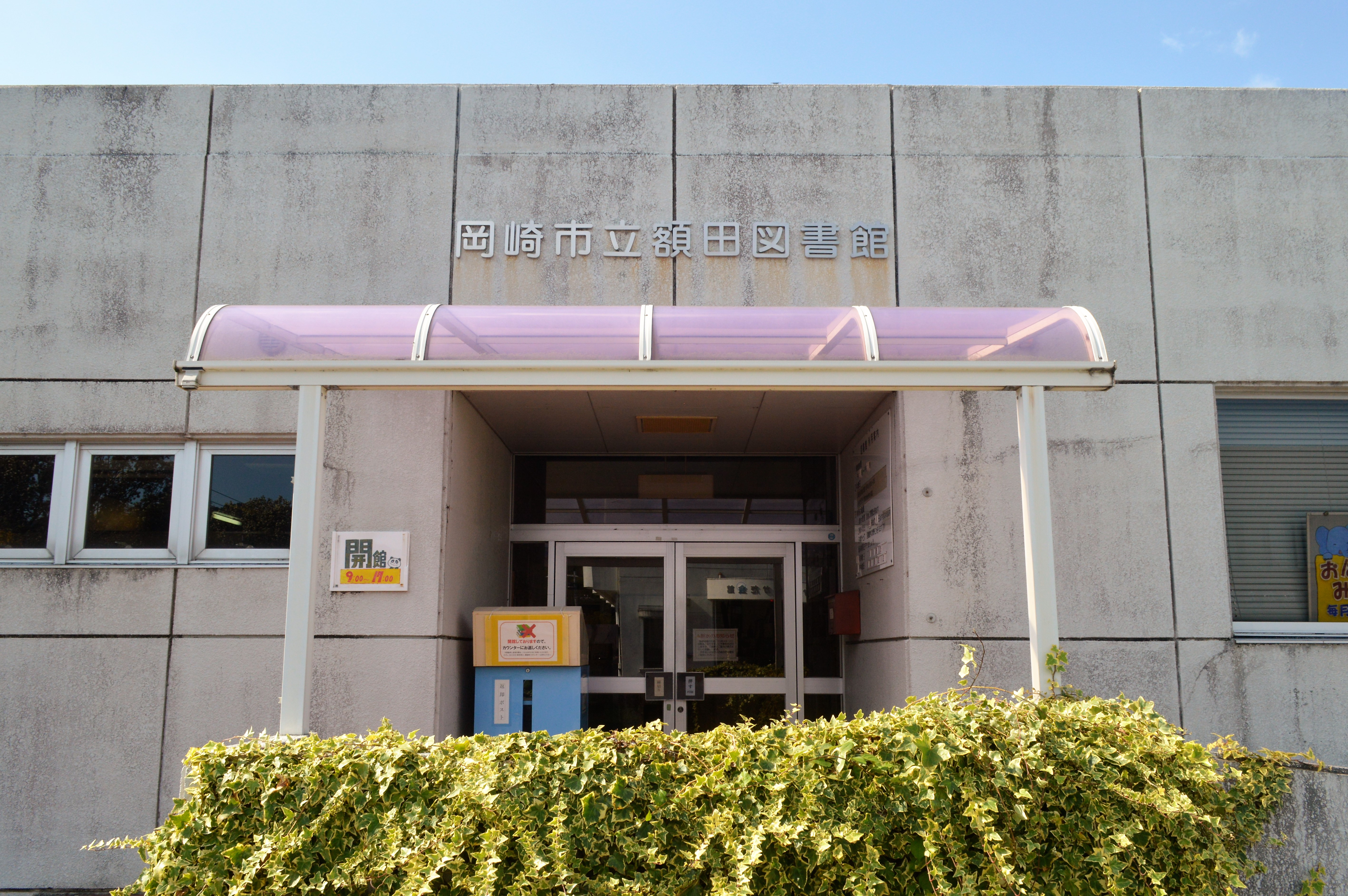 岡崎市立額田図書館。撮影の約2か月後に閉館予定。